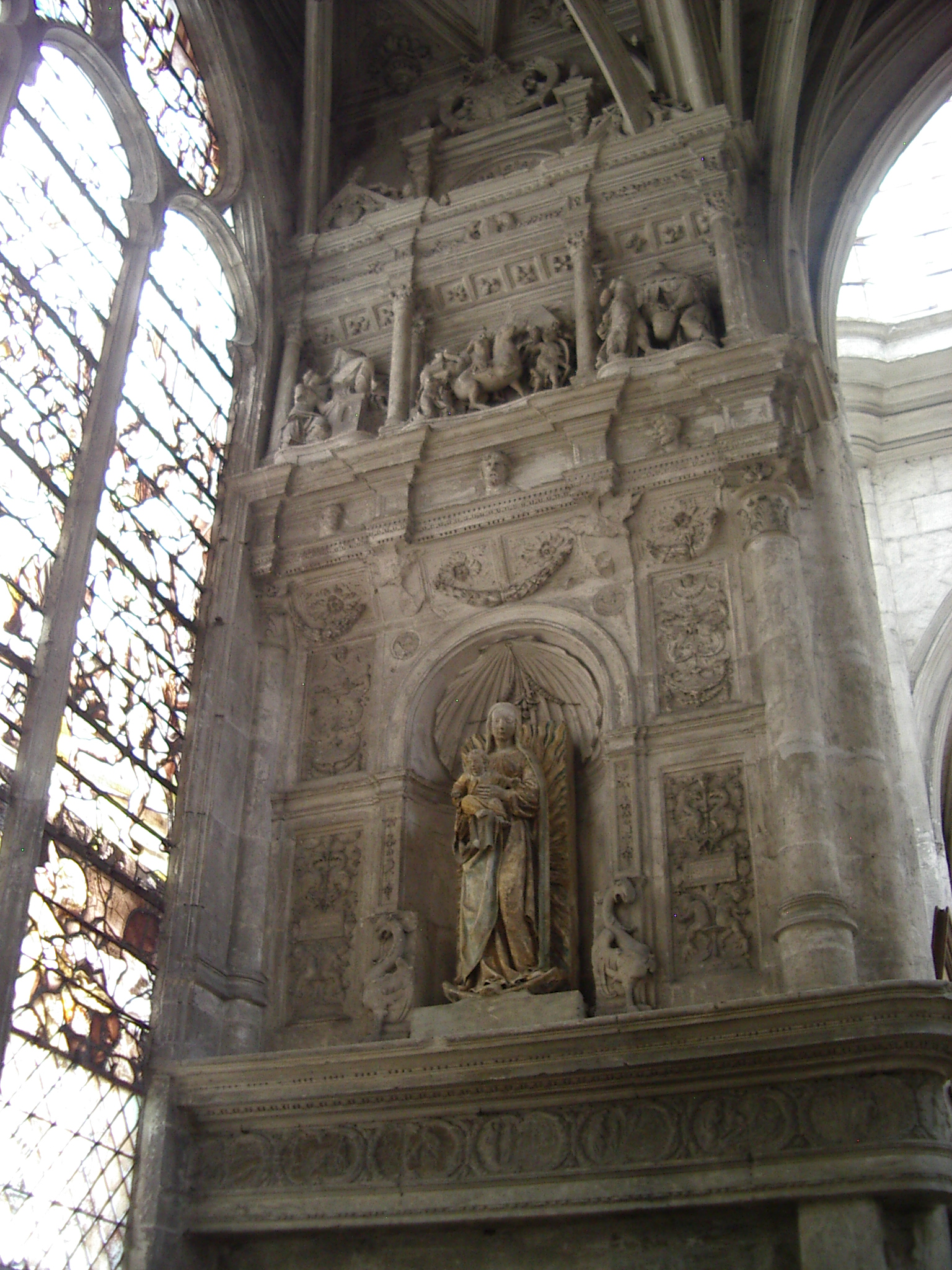 Domenico del Barbieri, Retrable de la chapelle saint Jacques, église saint Panteléon, Troyes